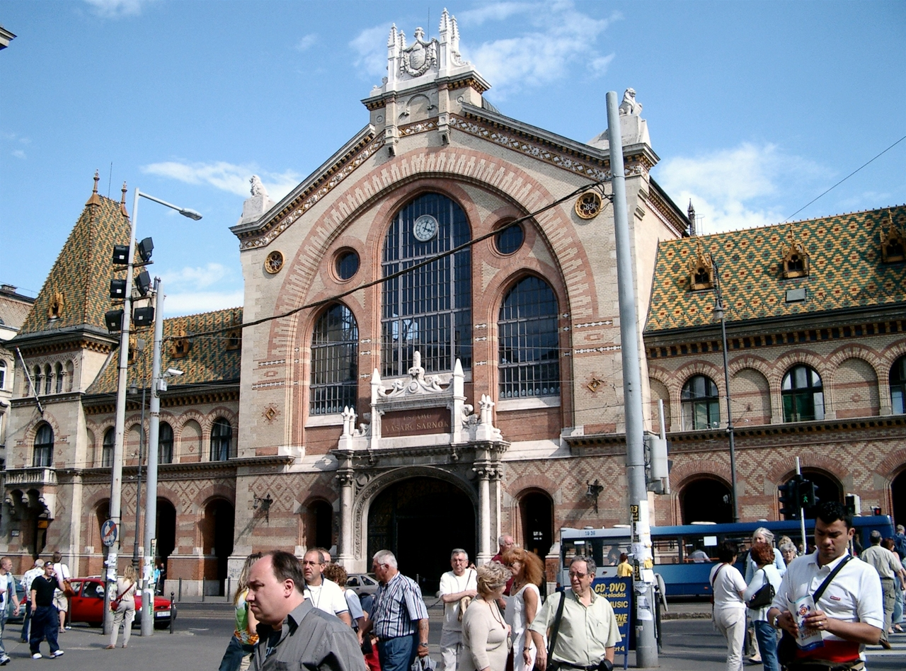 Maarthal zu Budapest